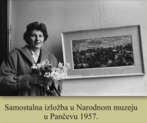 Srpski (latinica): Ksenija Ilijević, 1957